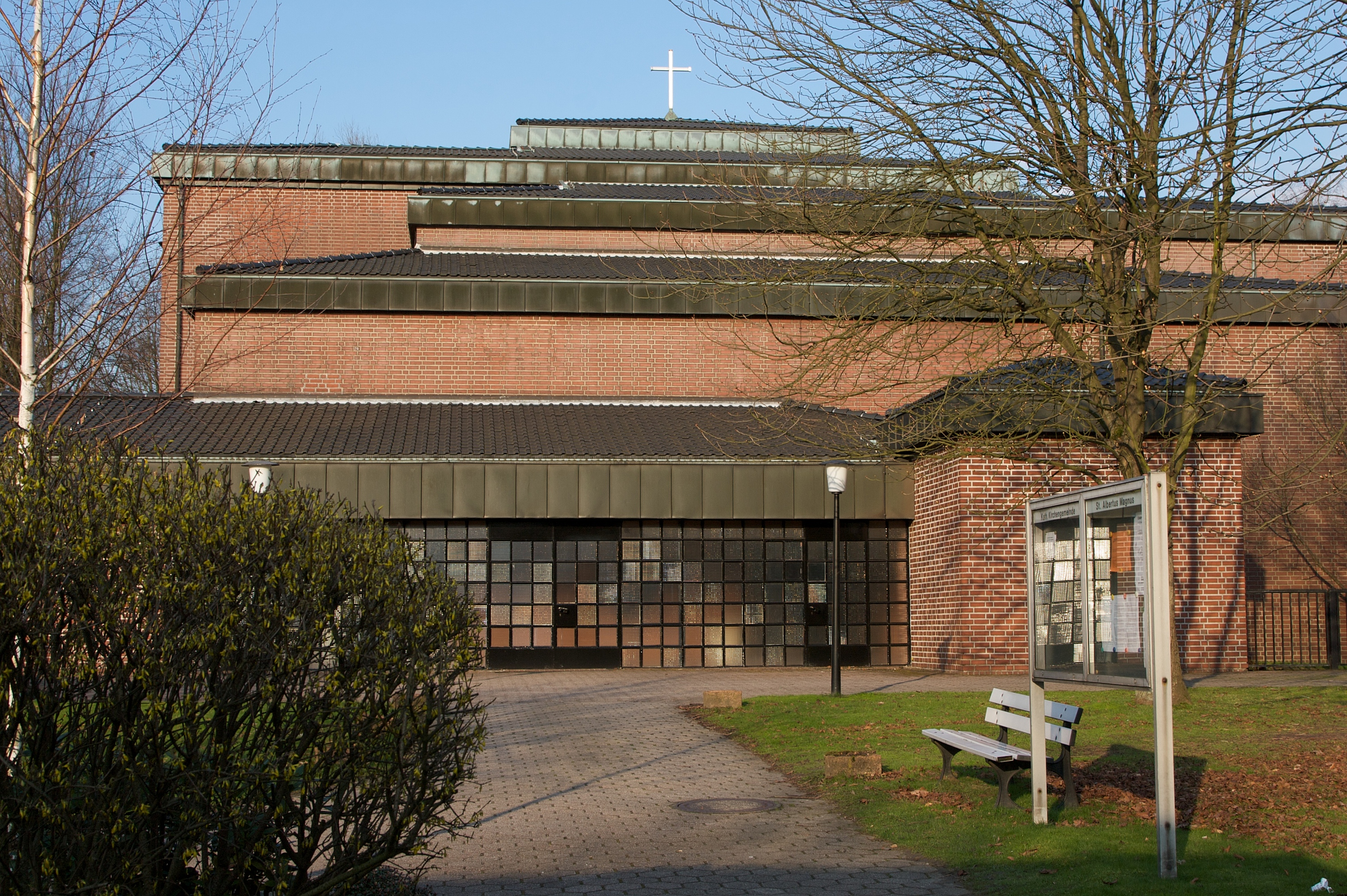 Frontansicht der ehemaligen Pfarrkirche St. Albertus Magnus in Bochum